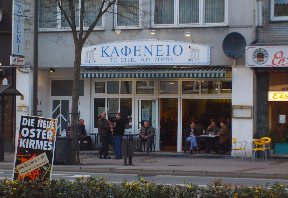 Καφενείο στο Βούπερταλ-Ομπερμπάρμεν, Wuppertal, Germany